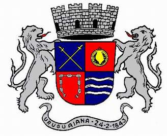 Brazão of city Uruguaiana